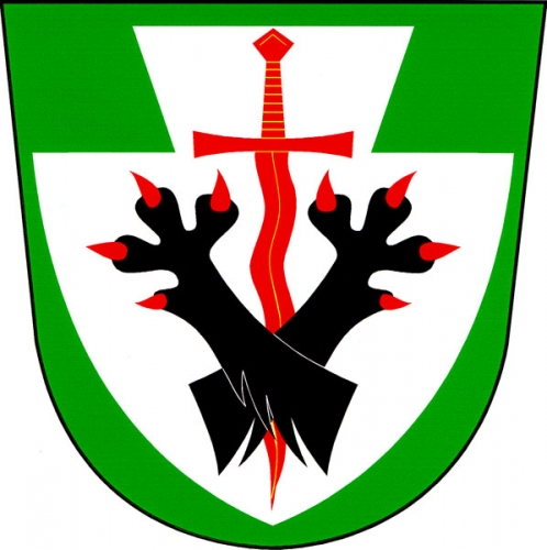 Znak, Rejchartice, okres Šumperk